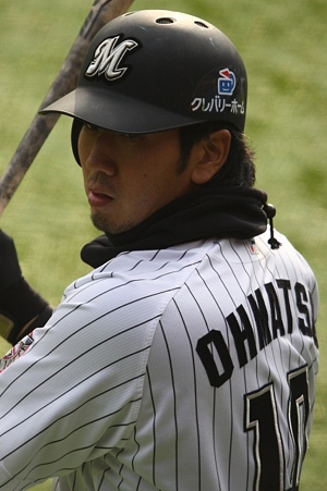 日本プロ野球 千葉ロッテマリーンズ 大松尚逸選手